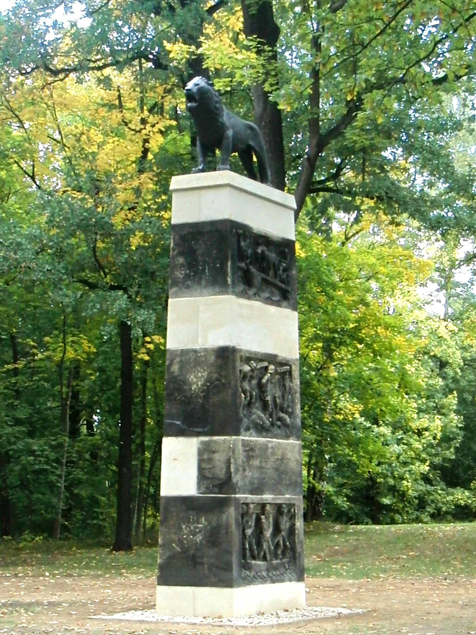 Feierliche Enthüllung des Pionierdenkmales des Bildhauer Hermann Kress am 13.10.2012 in Dresden